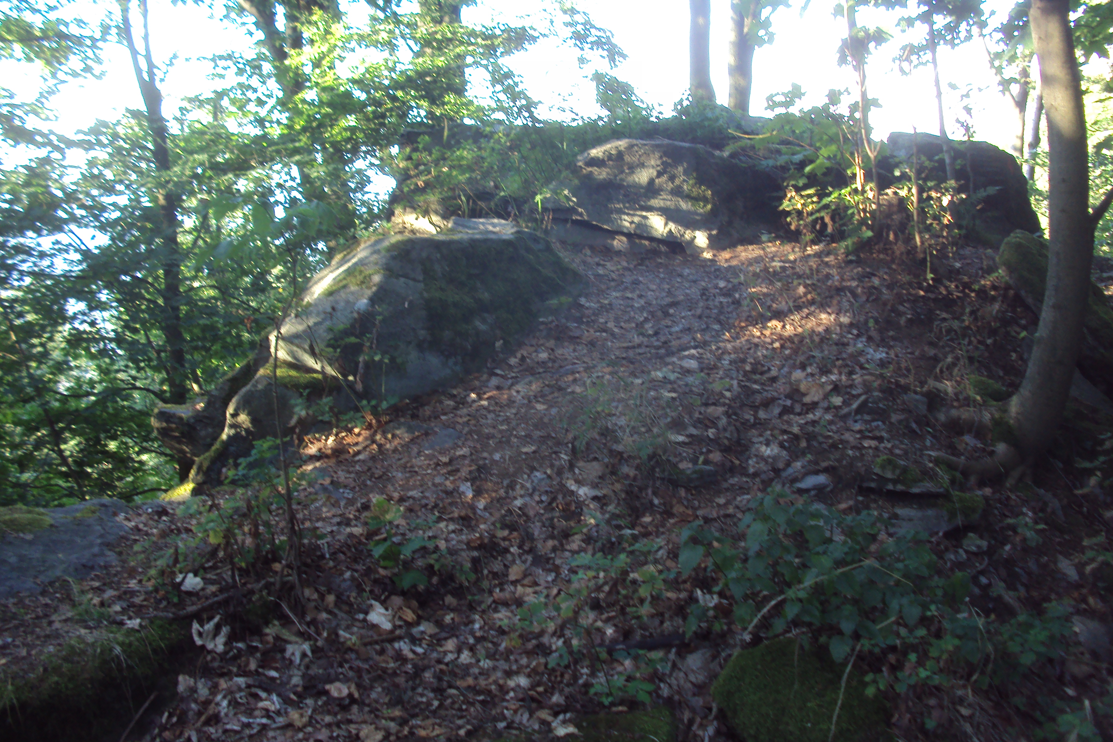 Vrcholová část Ortelu